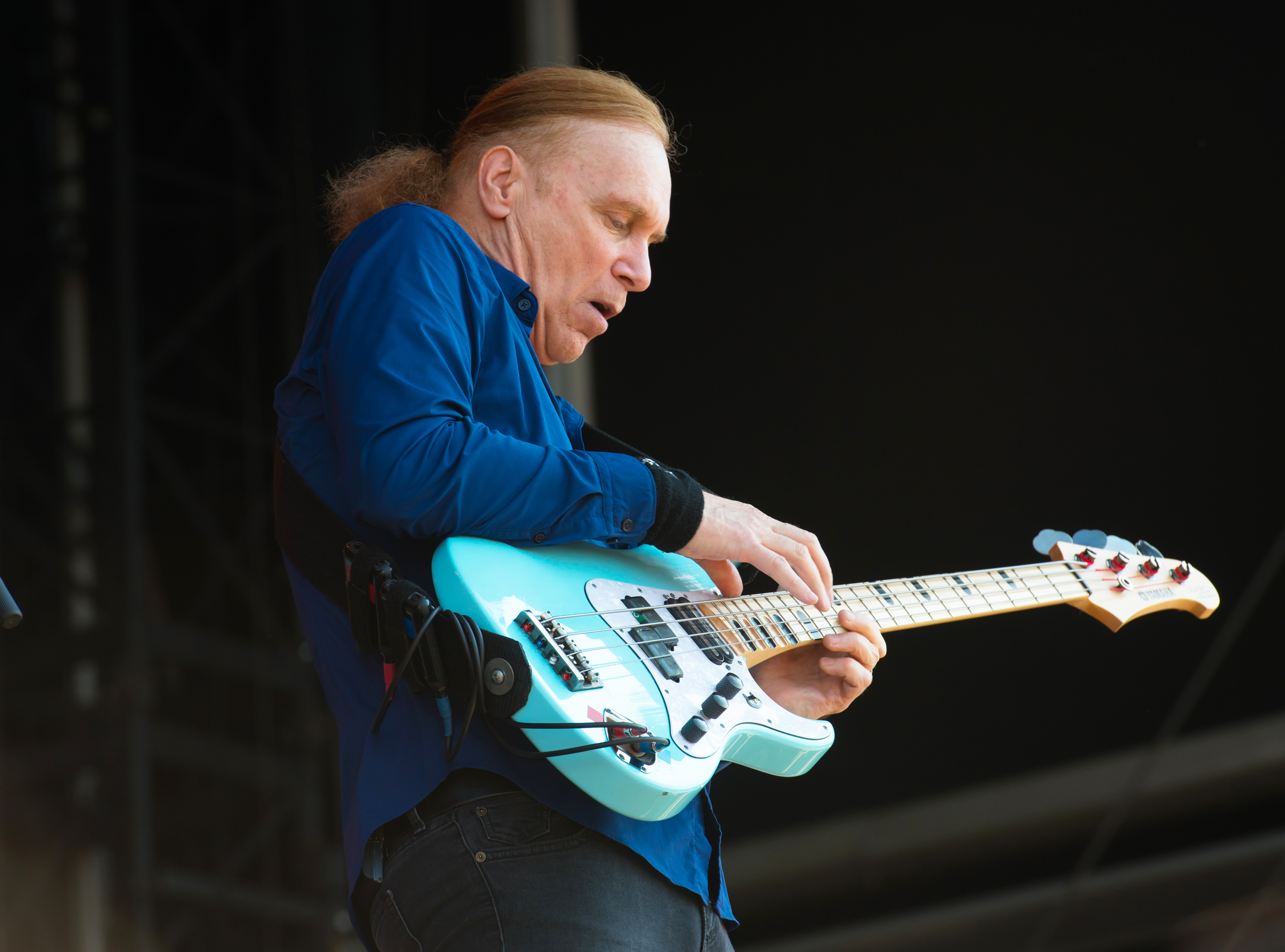 Mr. Big beim Wacken Open Air 2018